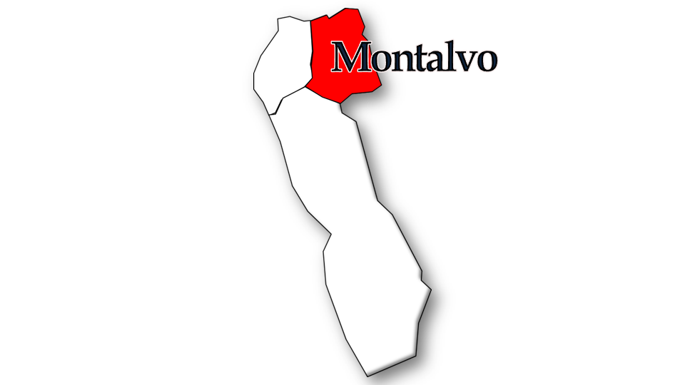 Evolução da População